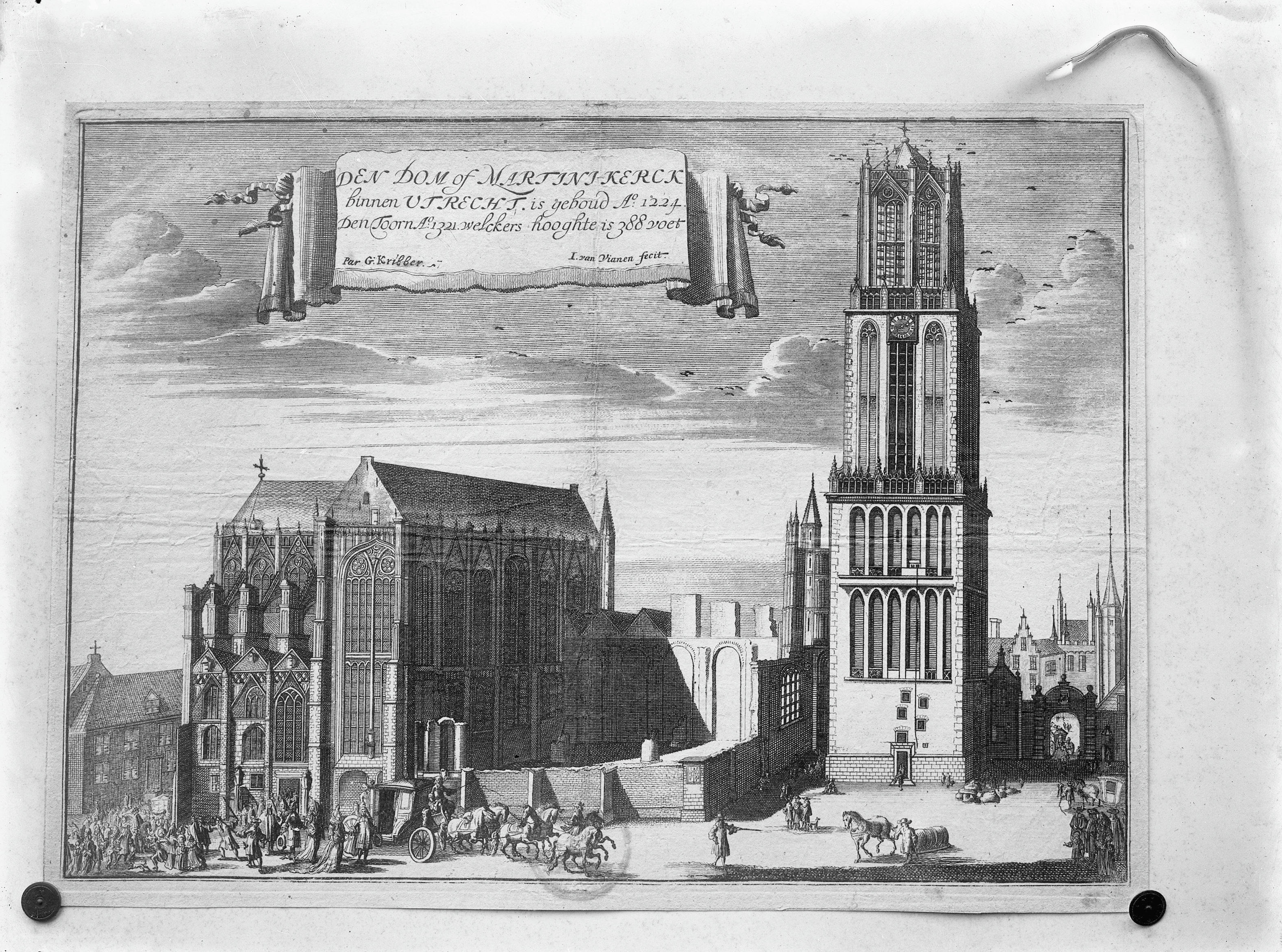 Domkerk, Inwendig: gezicht op het koor vanuit het noorden, gravure 1697 door I. van Vianen, Gemeente archief Utrecht nummer 1319